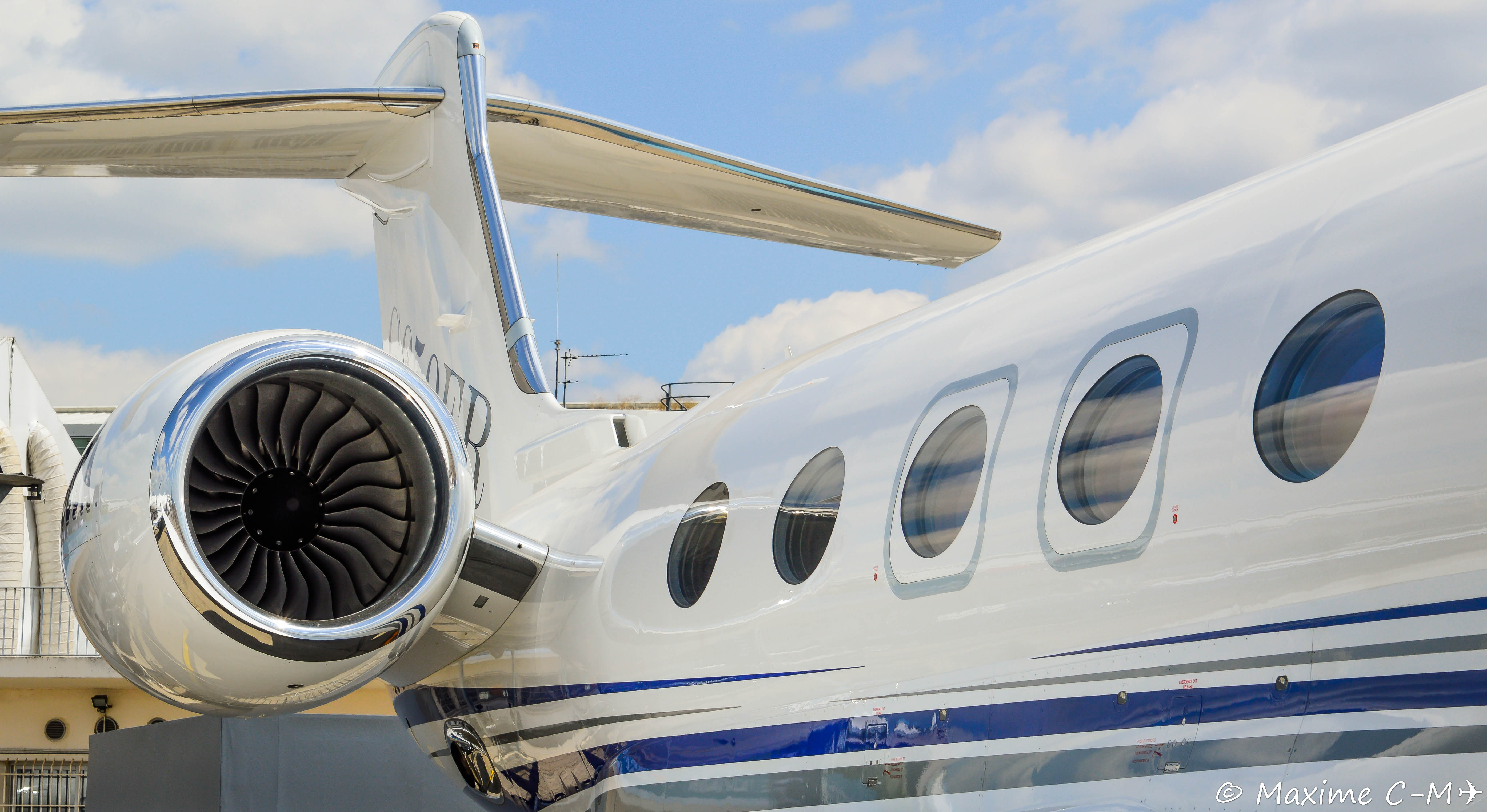 N650GA